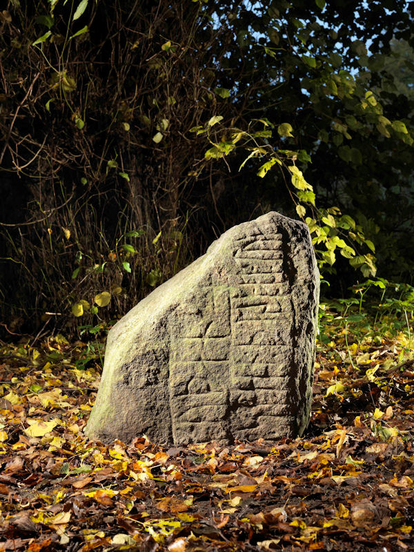 Foto af Roberto Fortuna